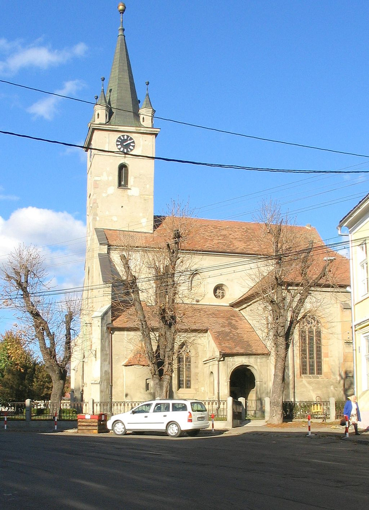 Biserica săsească 01